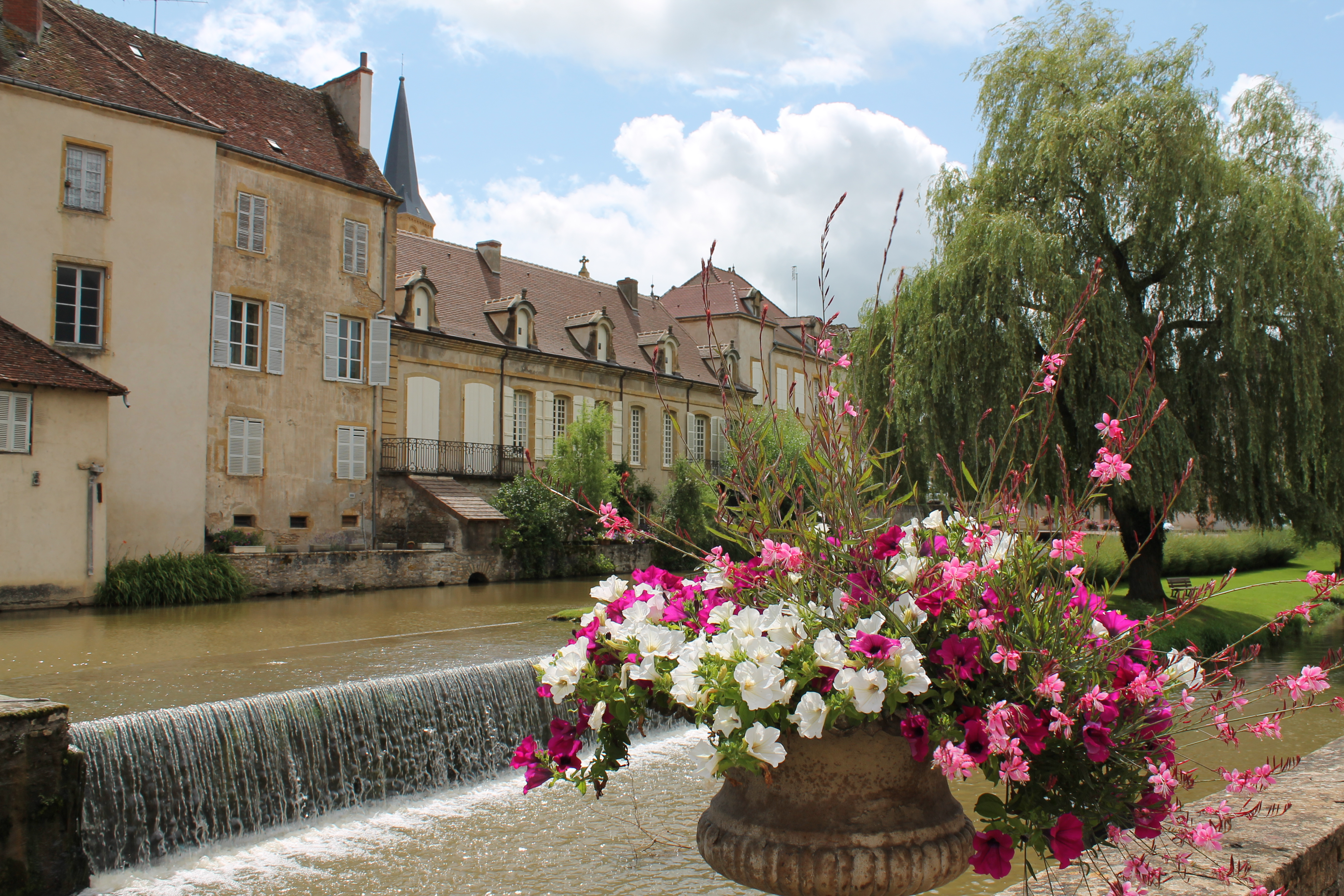 Grand pont de Charolles